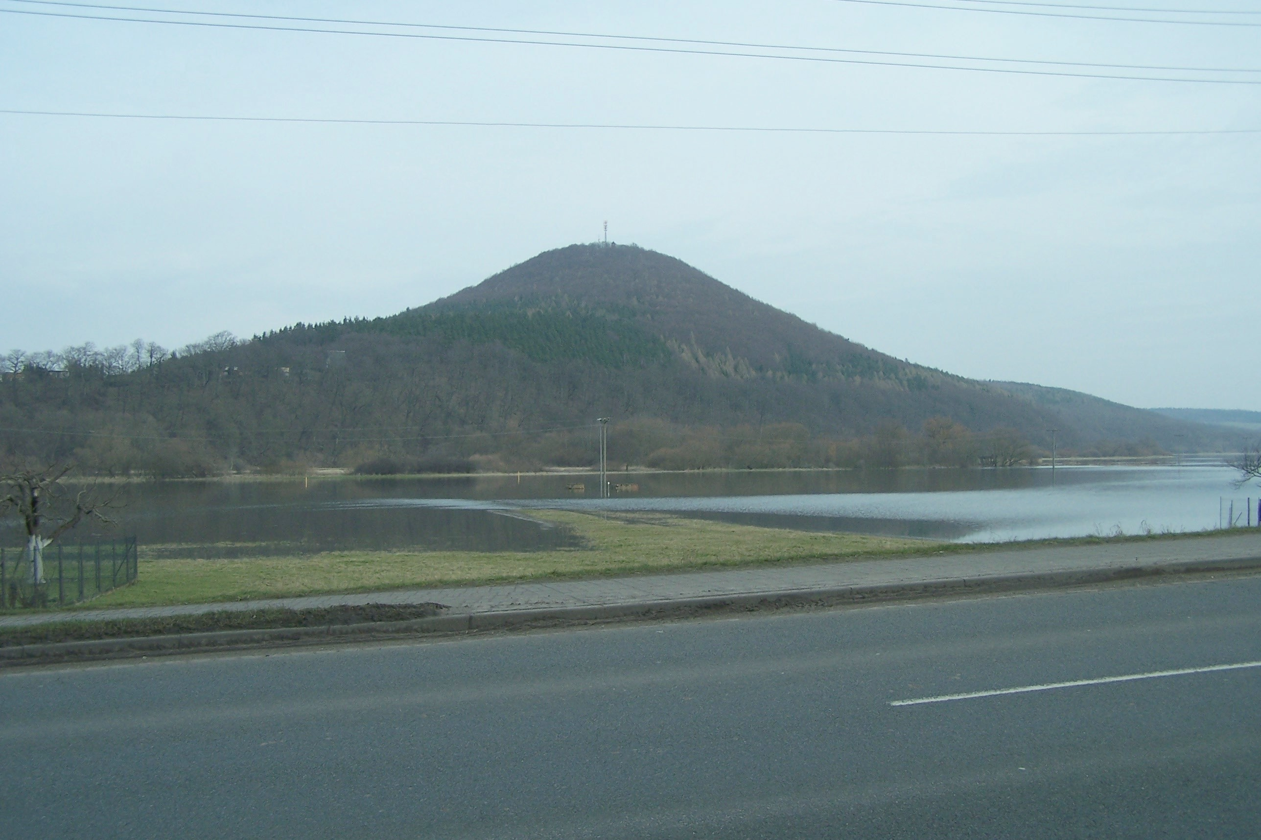 Das Frühjahrshochwasser der Werra, Mitte März 2009, bei Merkers.